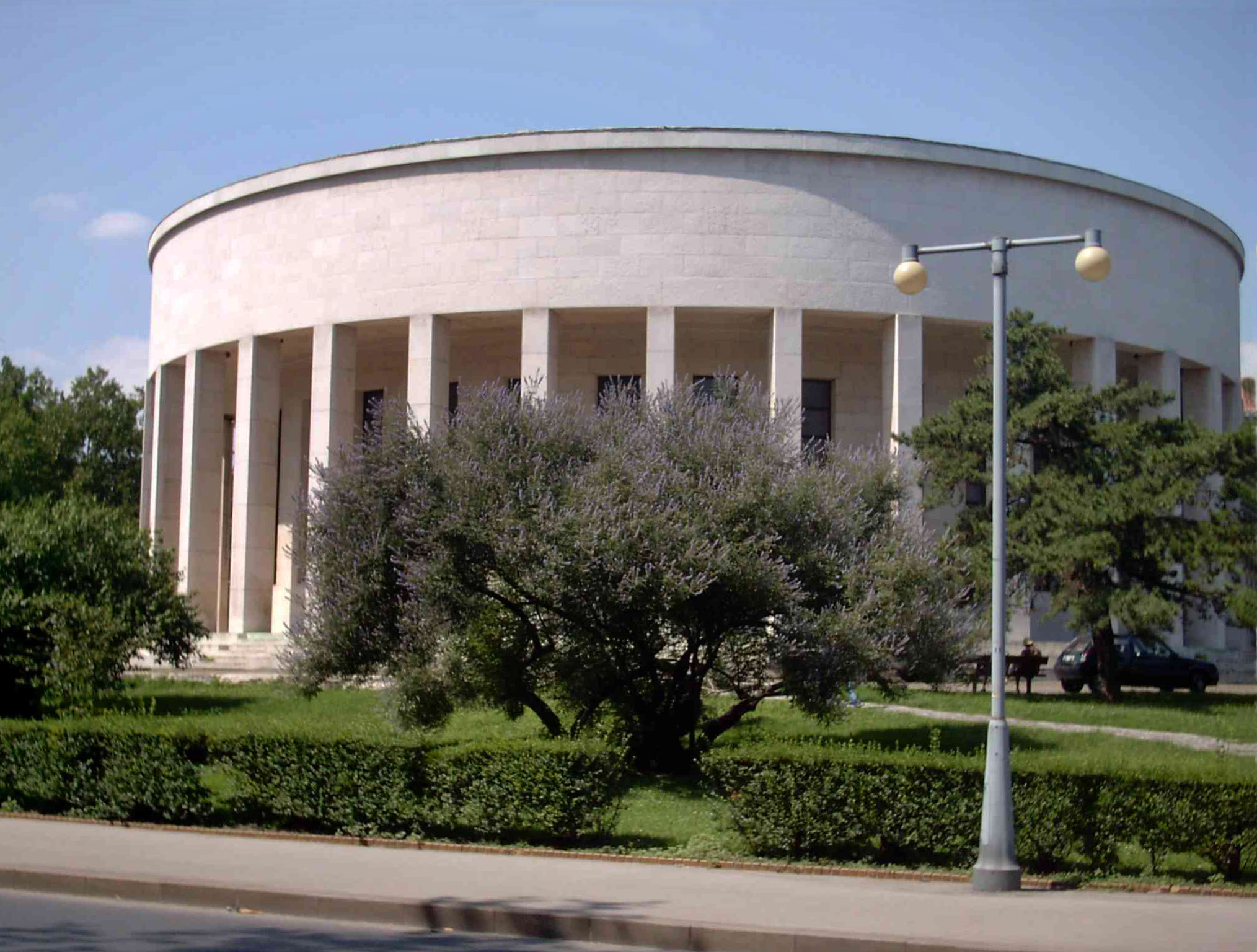 selbst erstellt